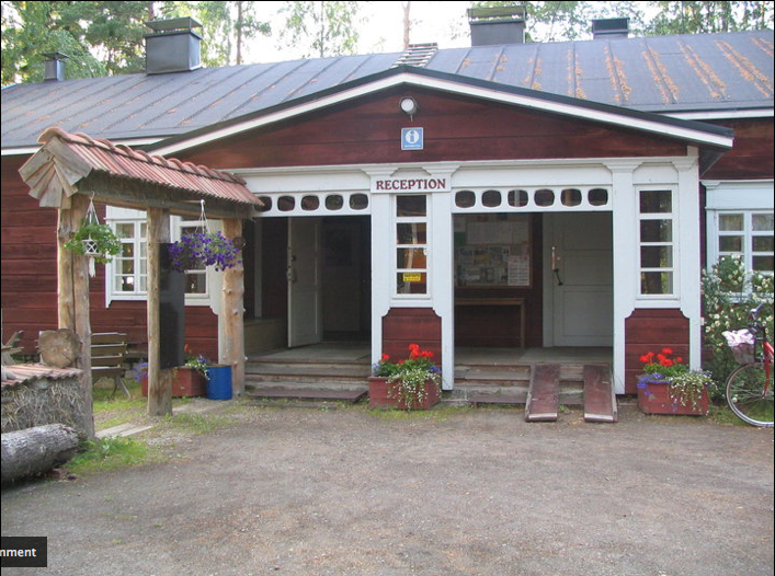 Nyyssänniemen leirintäalueen vastaanottorakennus Liukon Pirtti Keuruulla.